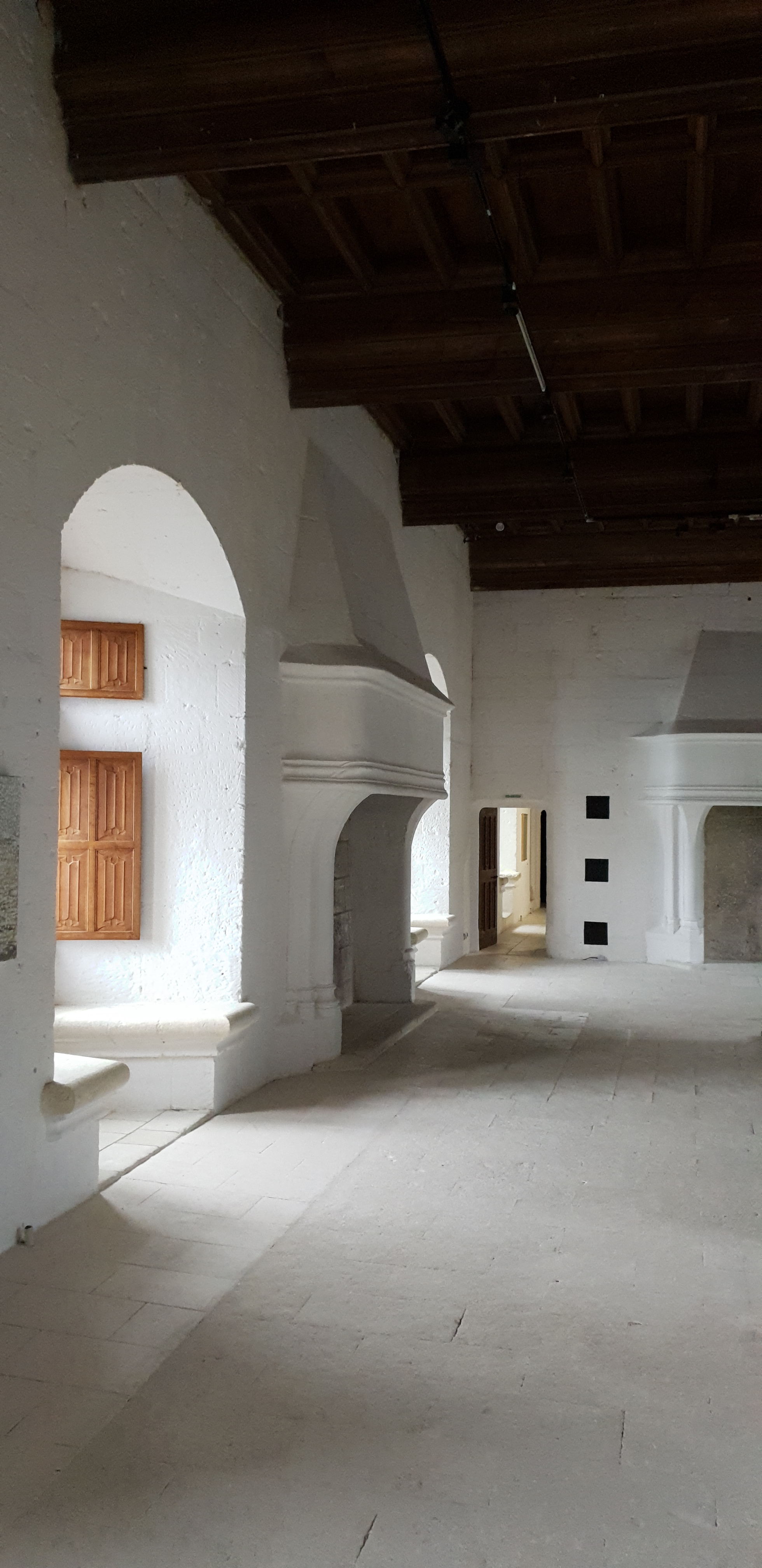 Une des salles du château de Montsoreau